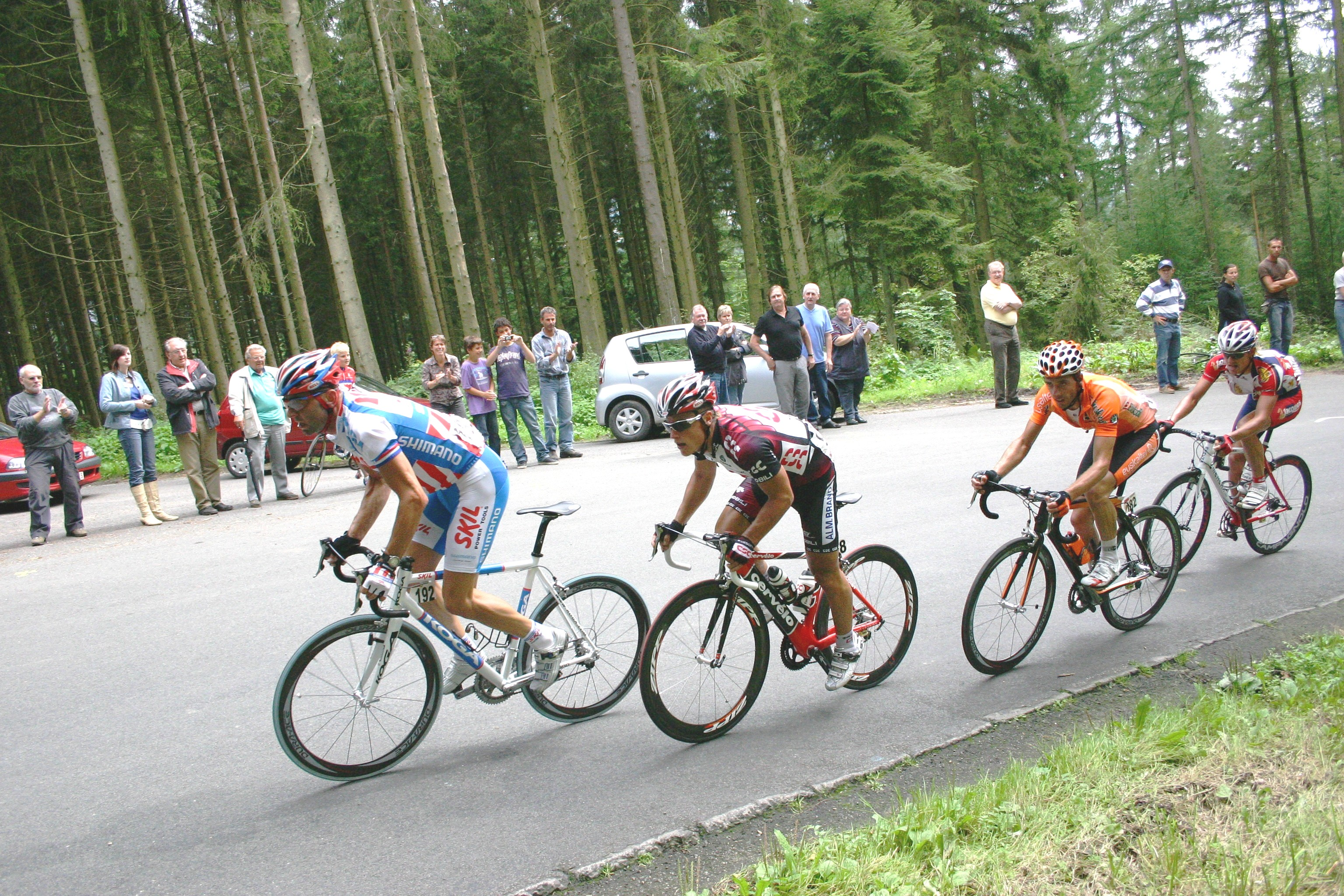 Eneco Tour Echappée Cête de Wanne mat Maarten Den Bakker, Martin Pedersen, Benat Albizuri Aransolo, Tom Stubbe. Kategorie:Vëlossport